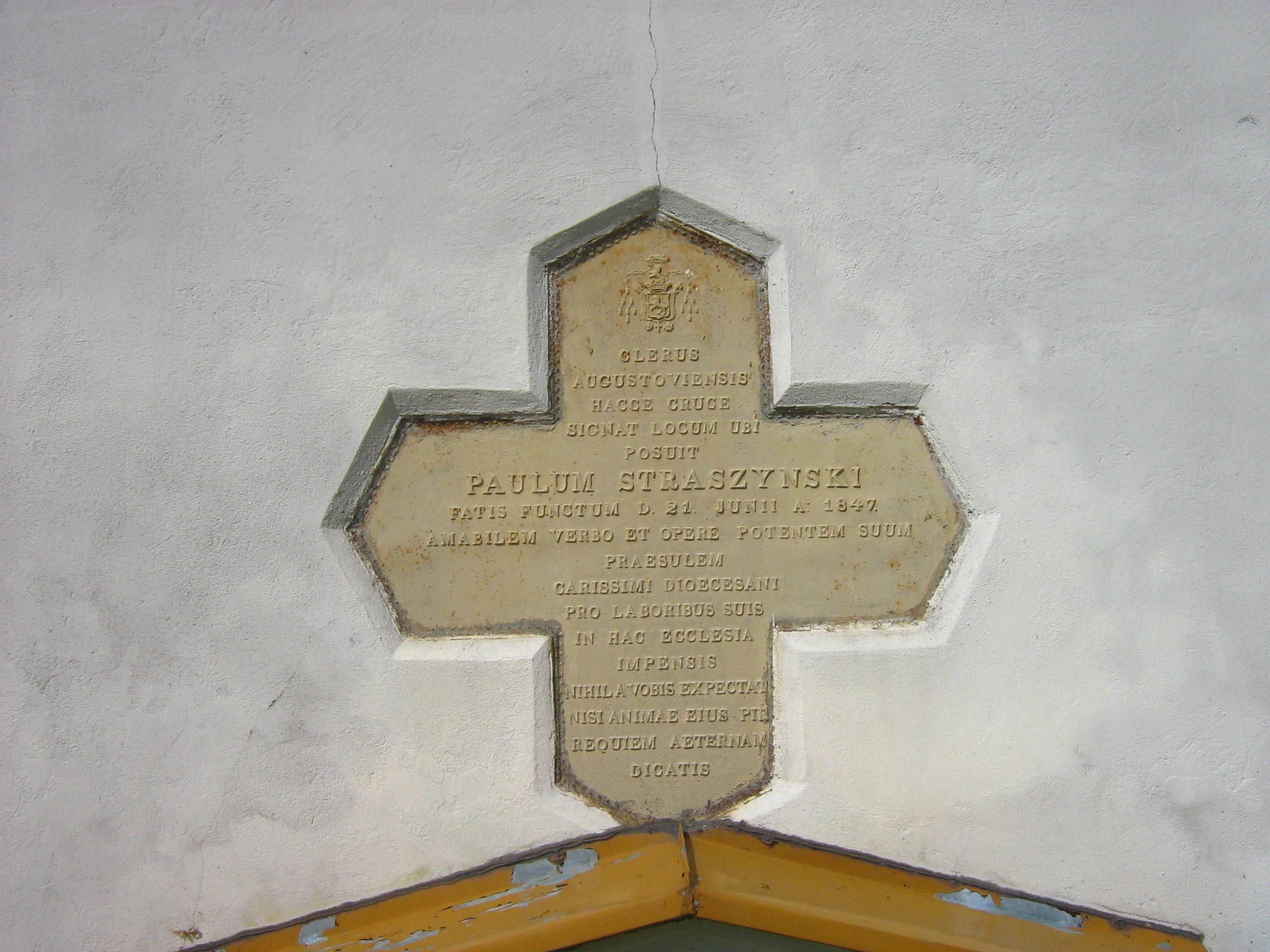 Krzyż nad drzwiami w obecnym muzeum Ziemi Sejneńskiej w Sejnach.